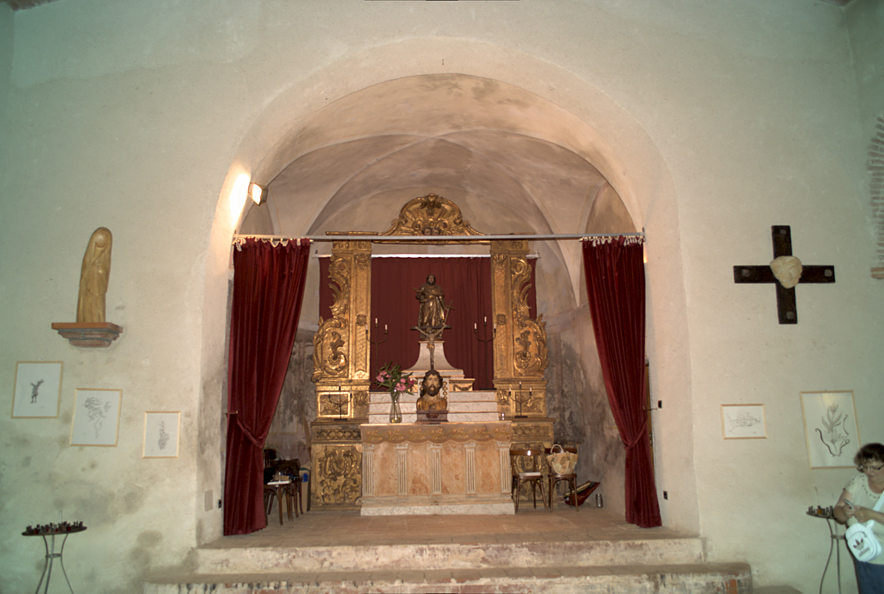 Retable et maitre-autel, Chapelle, hameau de Saint-Paul, Reynès (Pyrénées-Orientales, Languedoc-Roussillon, France)